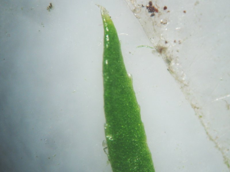 Sprossender Bärlapp Lycopodium annotinum, Müritz-Gebiet